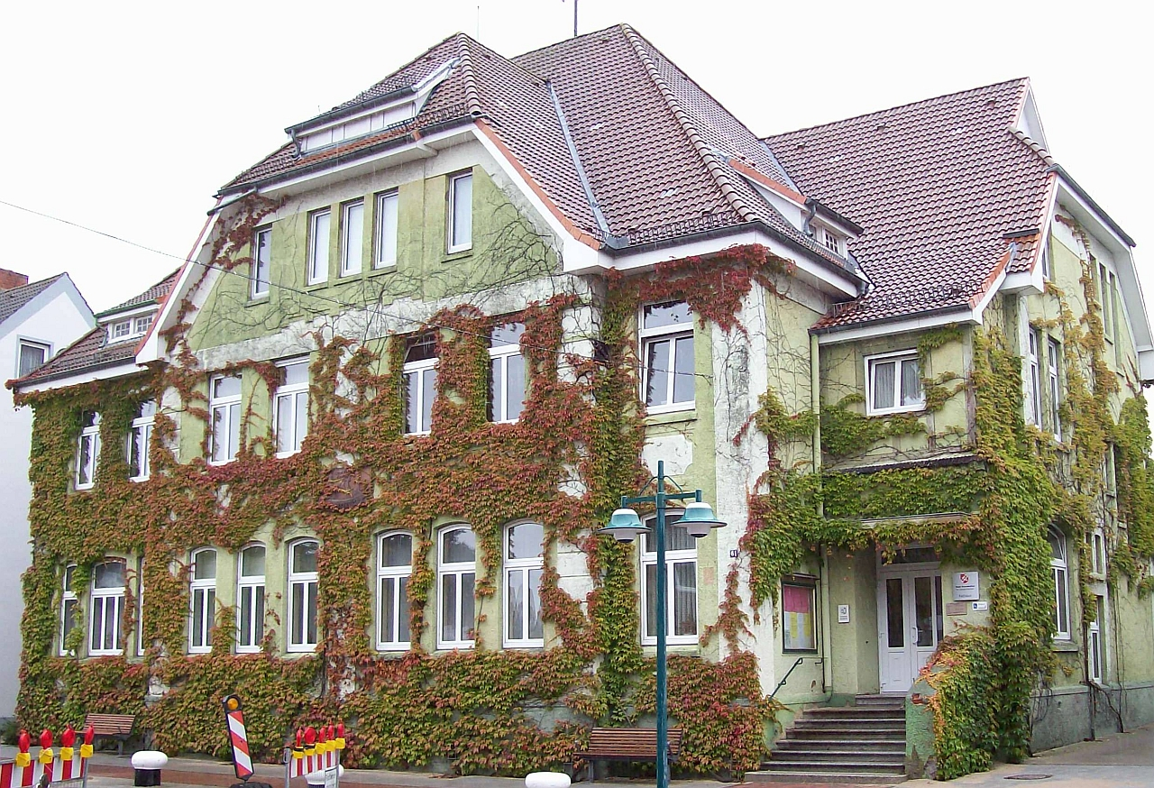 Rathaus Brunsbüttel (Germany)